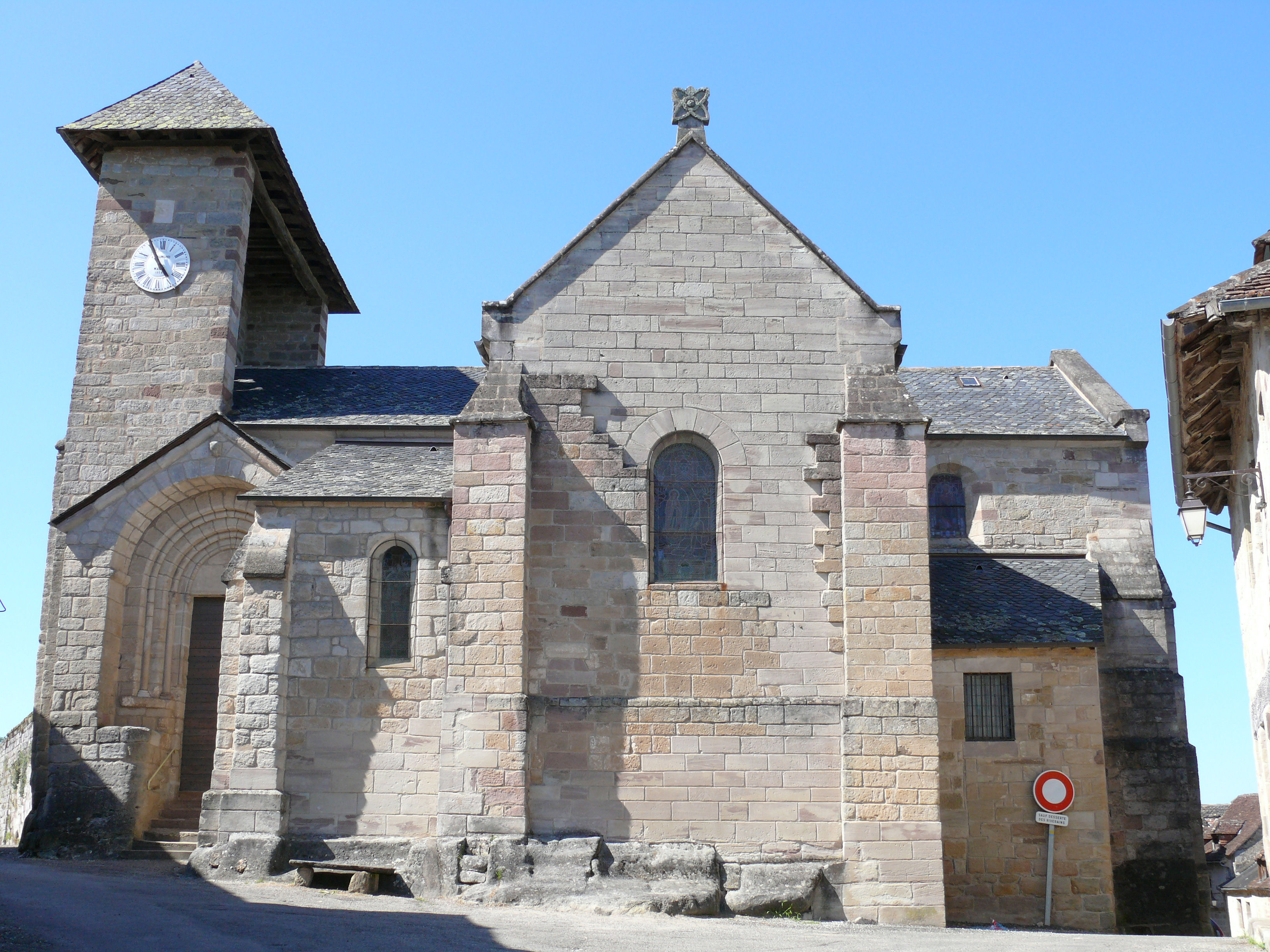 Curemonte (Corrèze) - Église Saint-Barthélemy